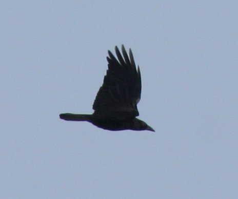 Bild einer Rabenkrähe (Corvus corone) im Flug Autor: Paneros